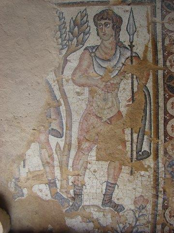 grafting, Sepphoris